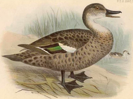 Anas gracilis, Grey Teal. Māori names Tētē, Pohoriki, Tētē-moroiti.